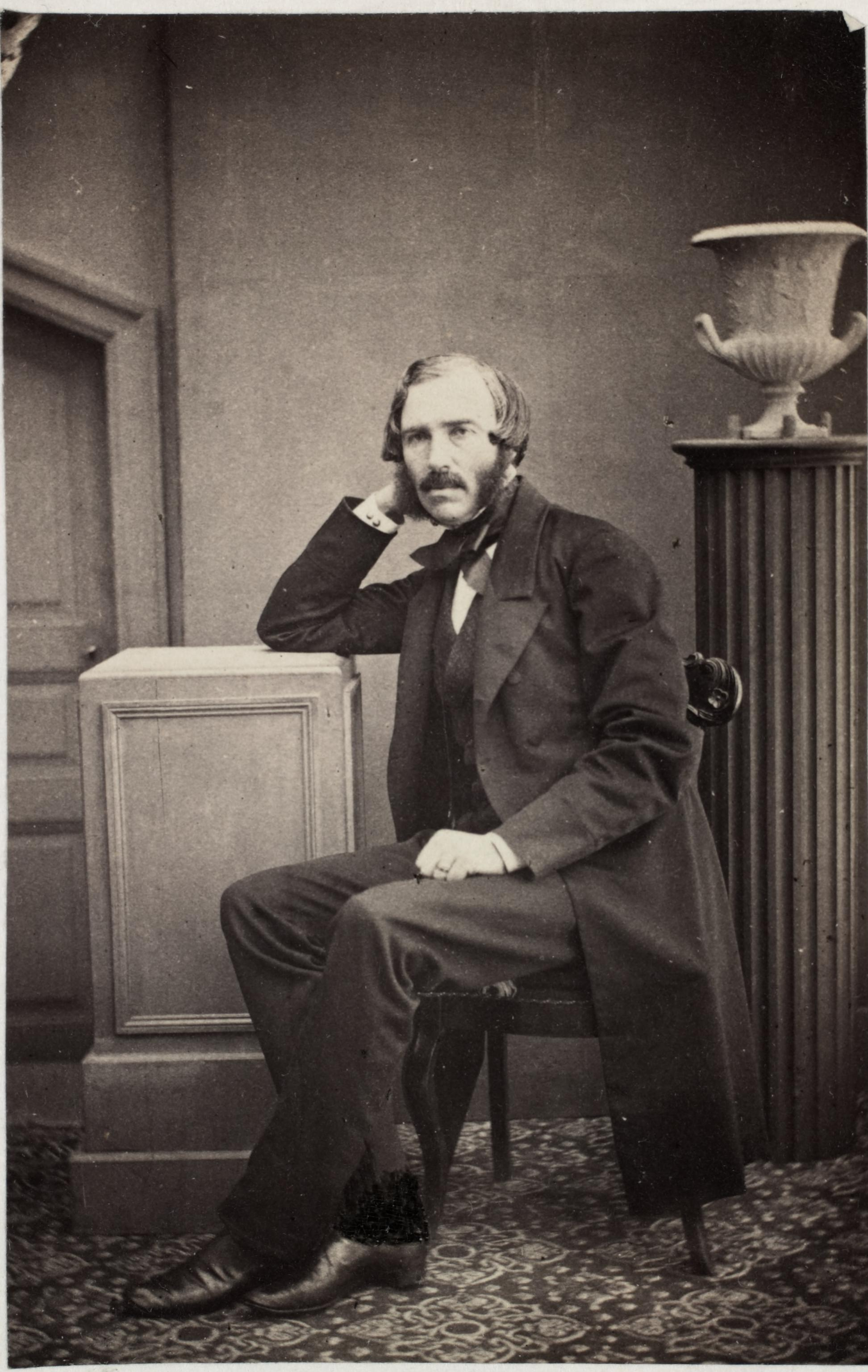 Bildet er hentet fra Nasjonalbibliotekets bildesamling Depicted person: Sibbern, Georg Christian